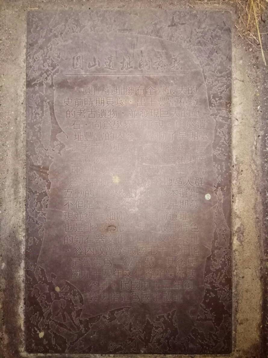 臺北市圓山捷運站外往淡水方向，原兒童育樂中心外人行道